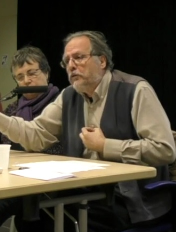 Conferència: L'aportació històrica del PSUC. Cotxeres de Sants. Barcelona (1 de diciembre de 2016)